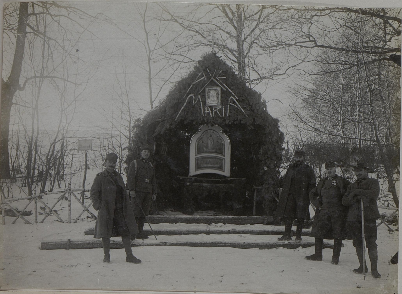 Waldkapelle des Infanterieregiments 4, hergestellt vom Infanteristen Johann Peterschelka der Regimentspionierabteilung beim Lager des III.Bataillons nordöstlich Alexandrowka